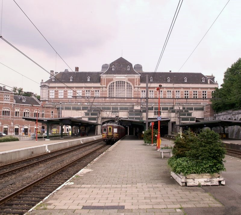 Bahnstrecke Verviers - Spa (Ligne 44), Belgien